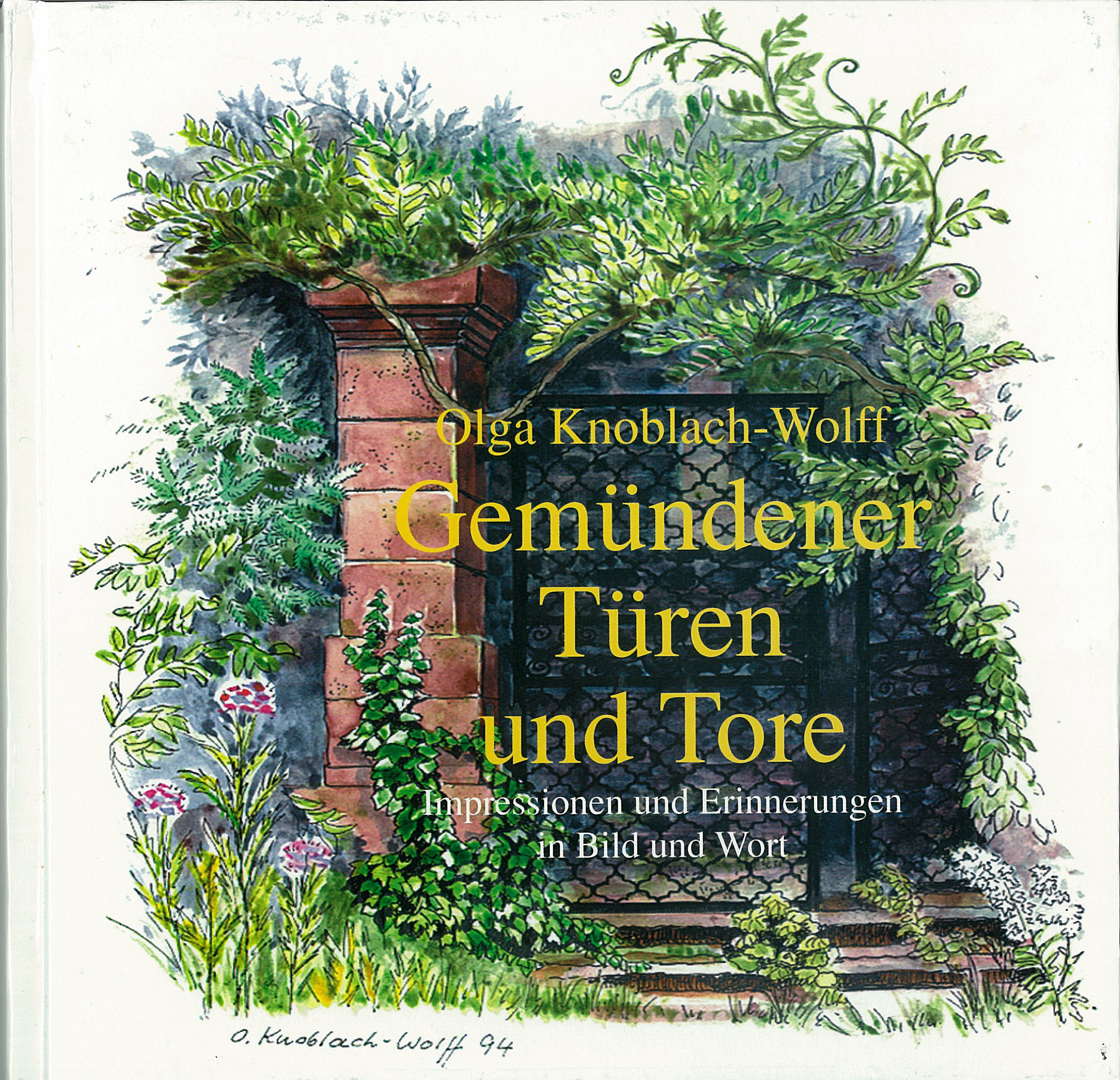 Buchdeckel:Gemündener_Türen_und_Tore